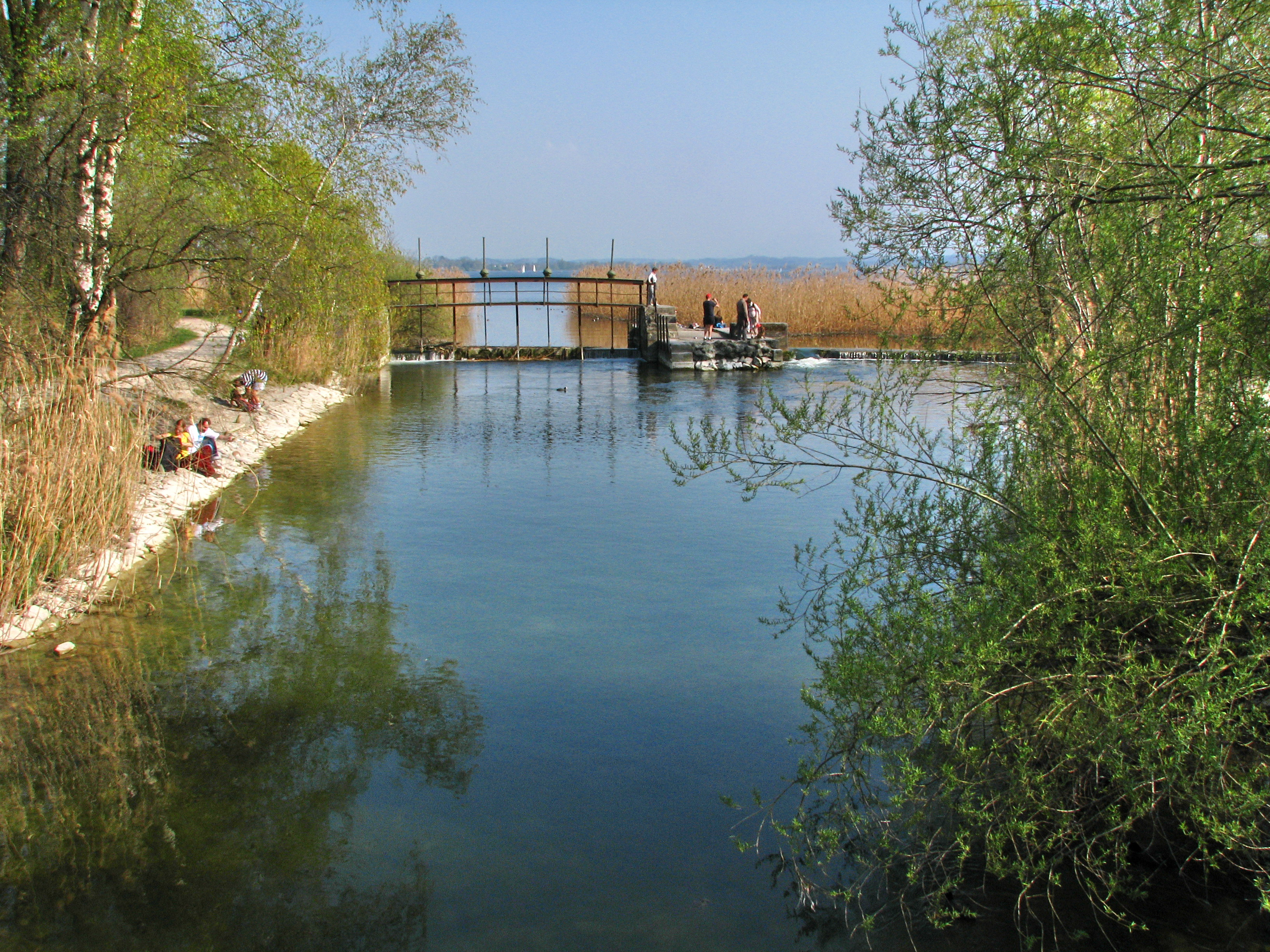 Greifensee (Lake Greifen) as seen from Glatt effluence in Schwerzenbach